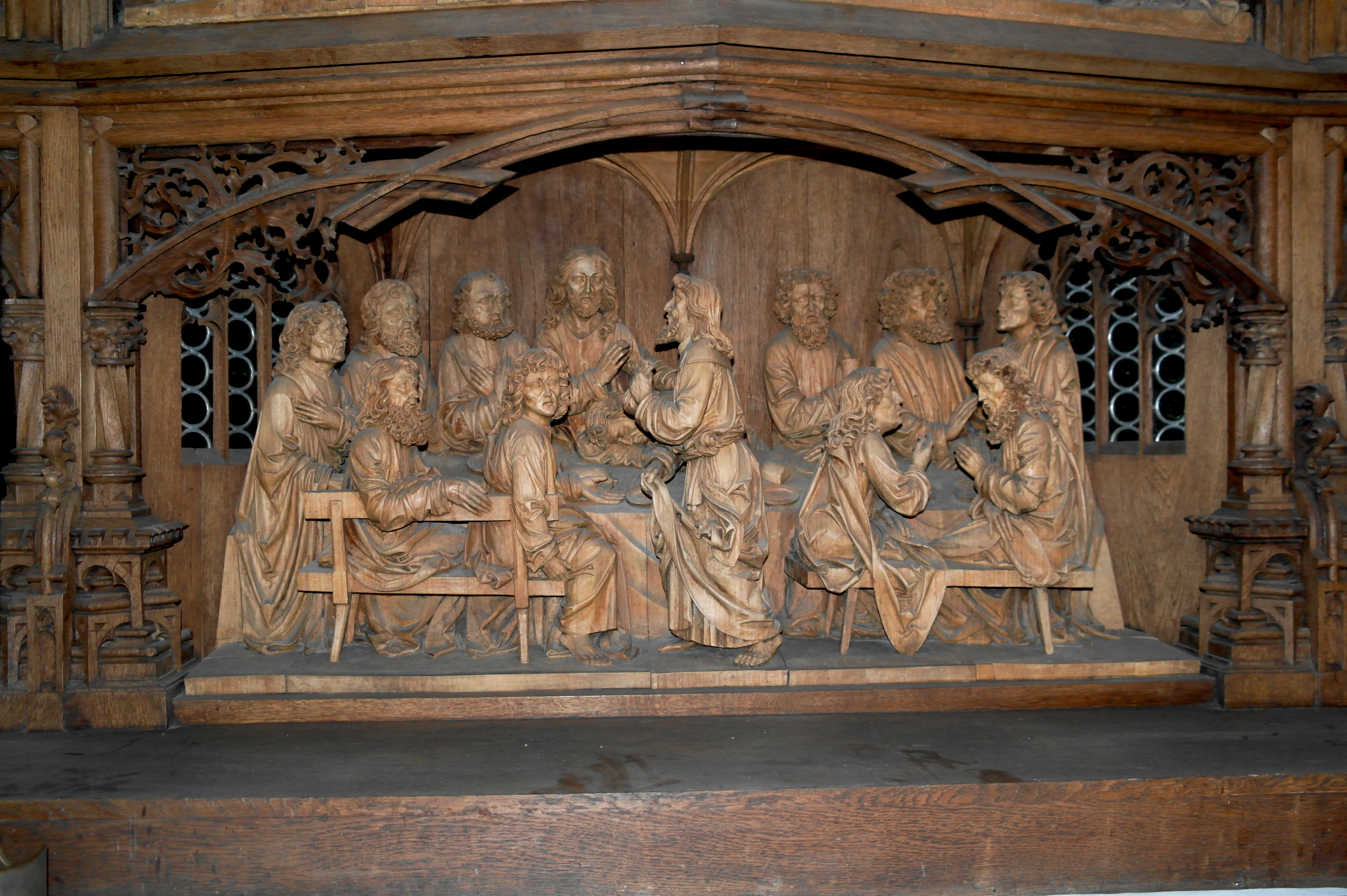 Abendmahlsszene in der Predella des neugotischen Hochaltars der evangelisch-lutherischen Stadtpfarrkirche St. Mang in Kempten, Leonhard Vogt, 1893.